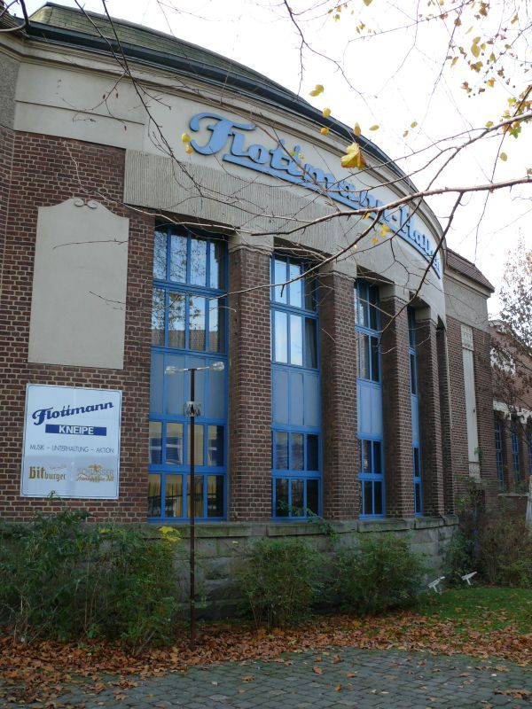 Flottmann Hallen, eigenes Bild